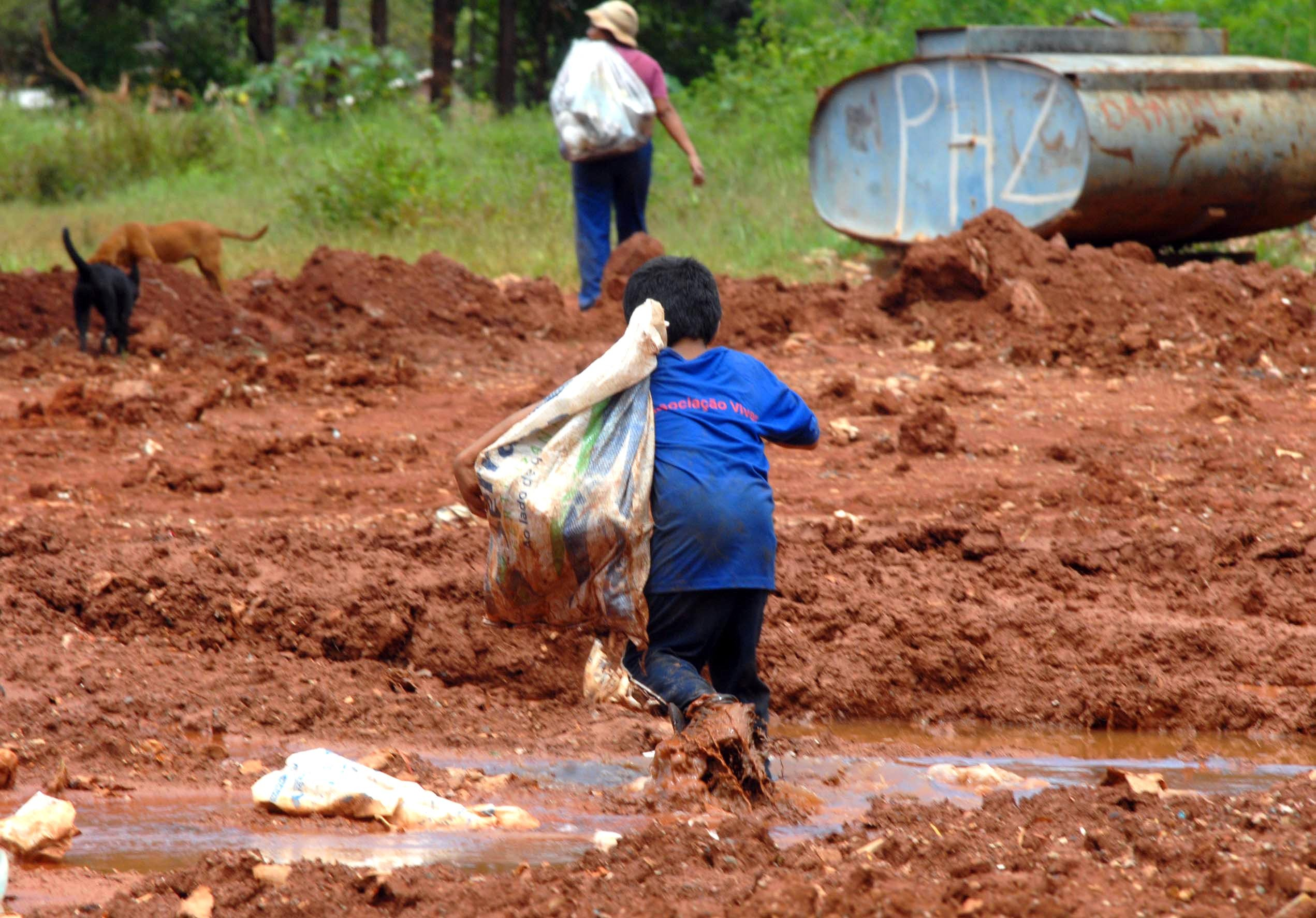 Criança saindo do Lixão da Cidade Estrutural, DF-BR